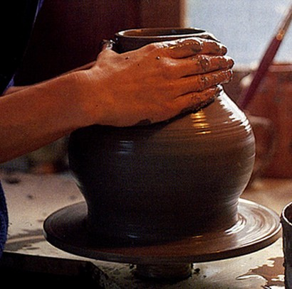 Modelando una vasija en un torno eléctrico.